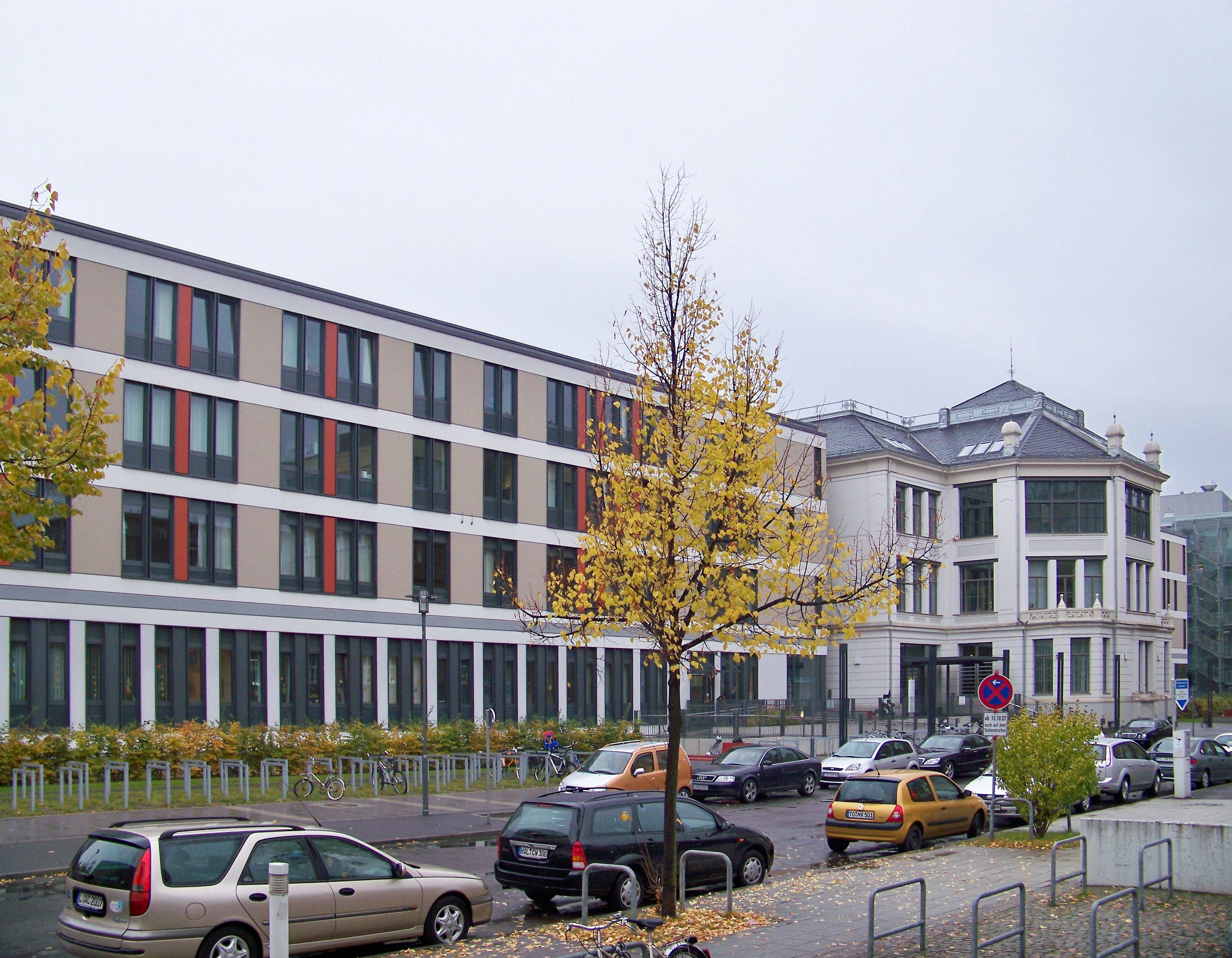 Zentrum für Frauen- und Kindermedizin des Universitätsklinikums Leipzig in der Liebigstraße 20a